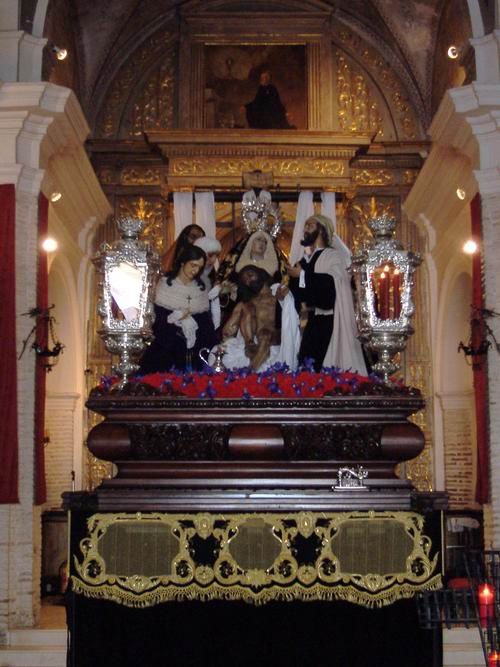 Misterio de la Sagrada Mortaja de la Hermandad homónima de Écija.